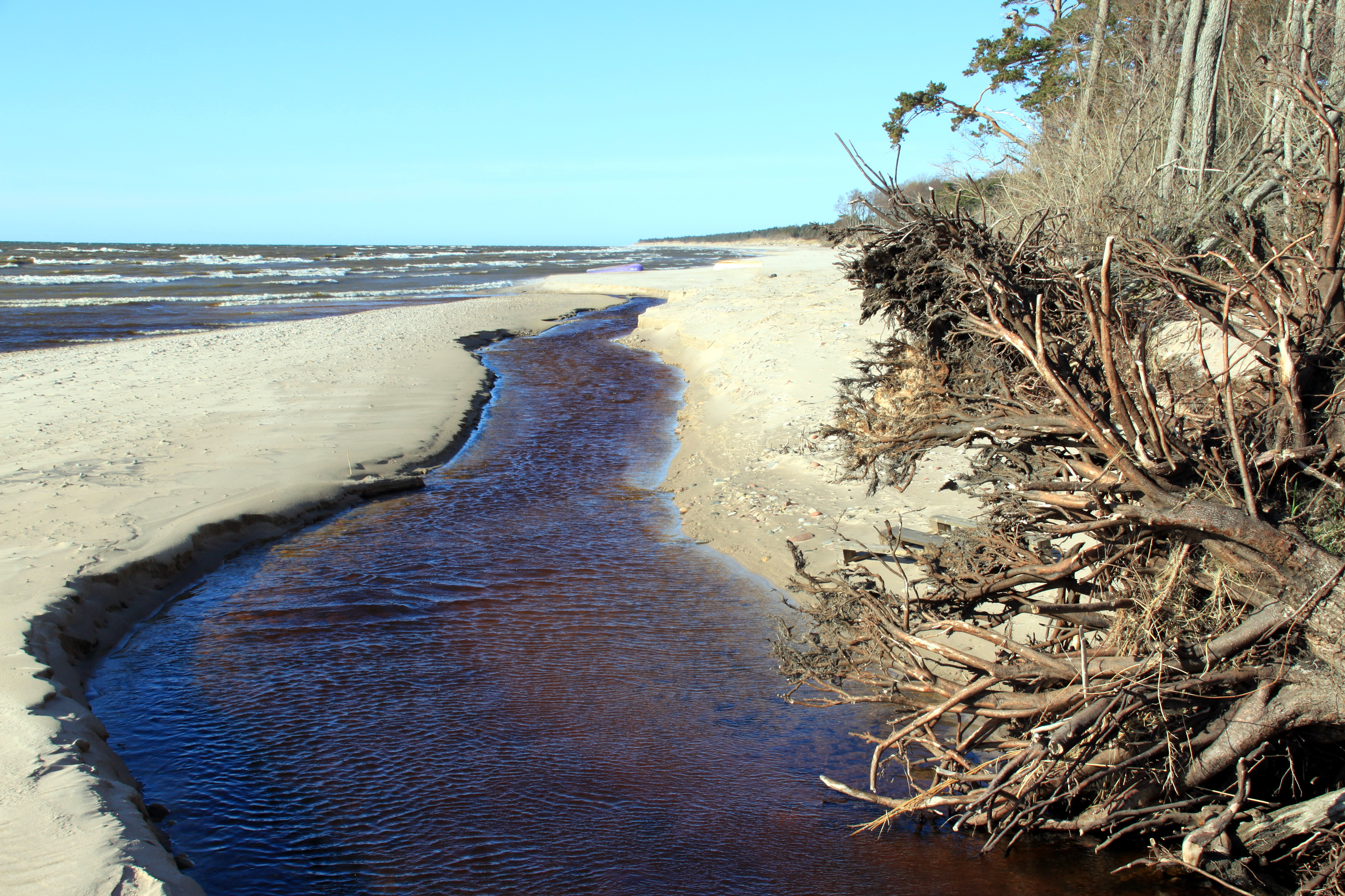 Jaunupe, Liepene